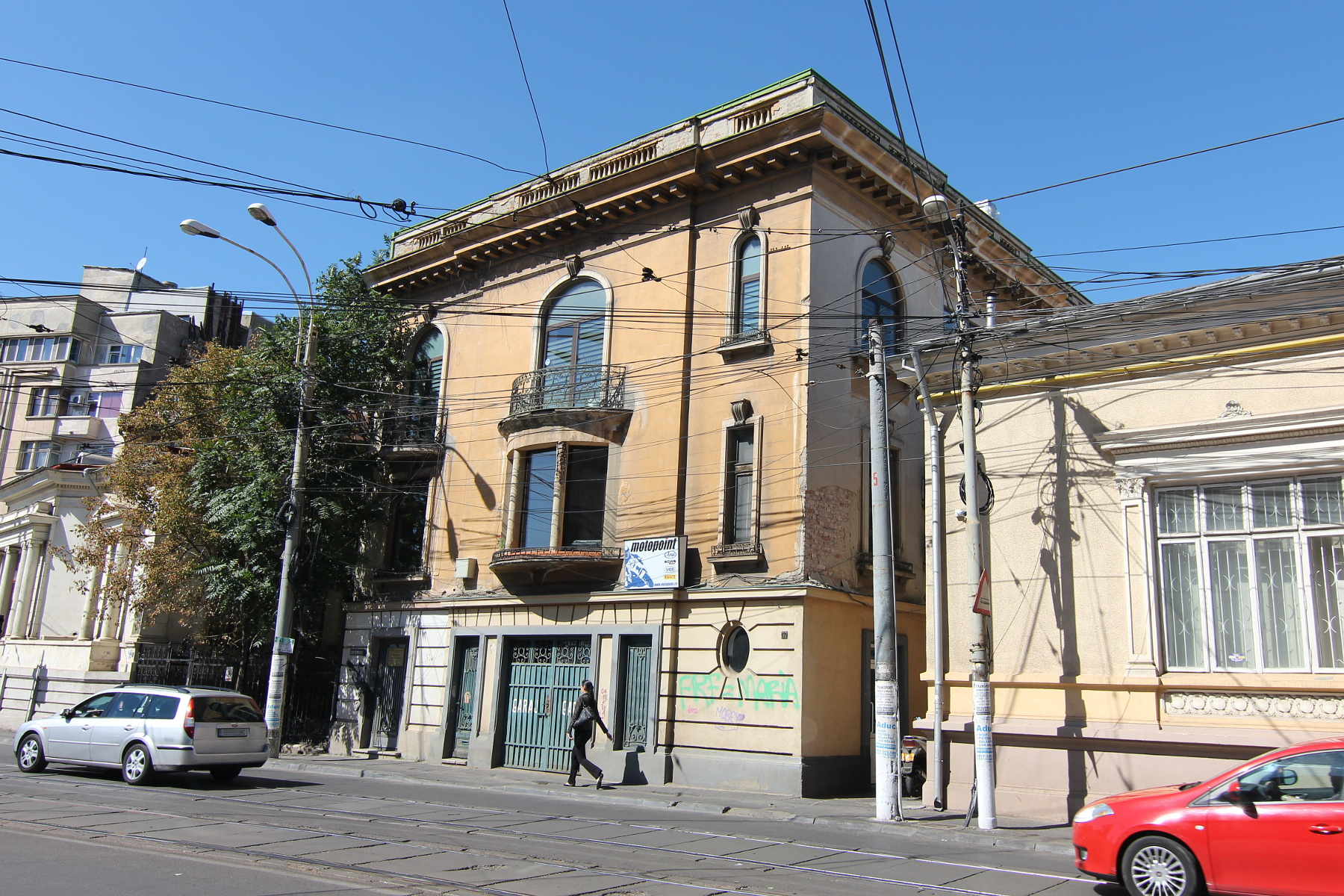 Casă pe Calea Călărașilor